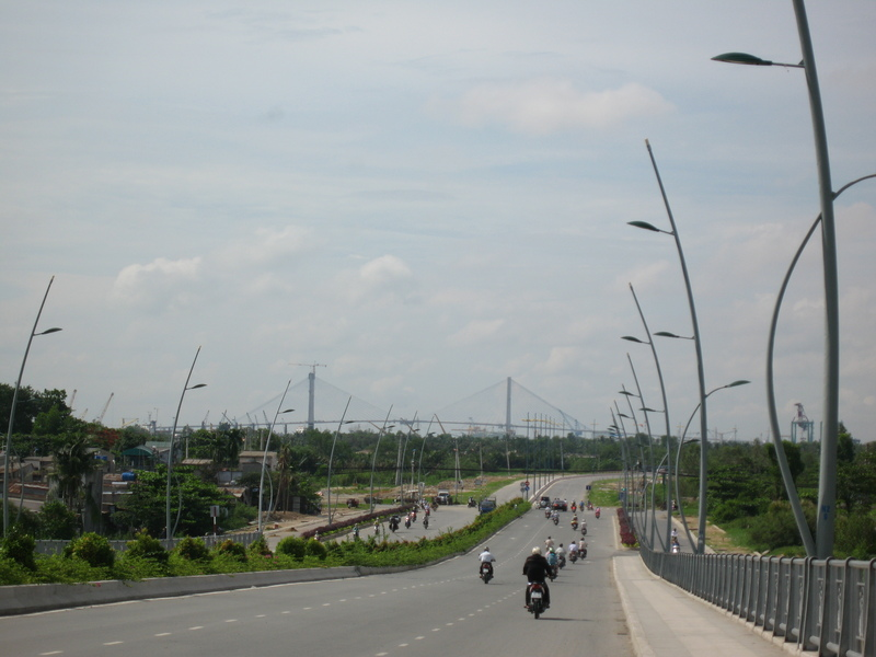 Cấu Thủ Thiêm